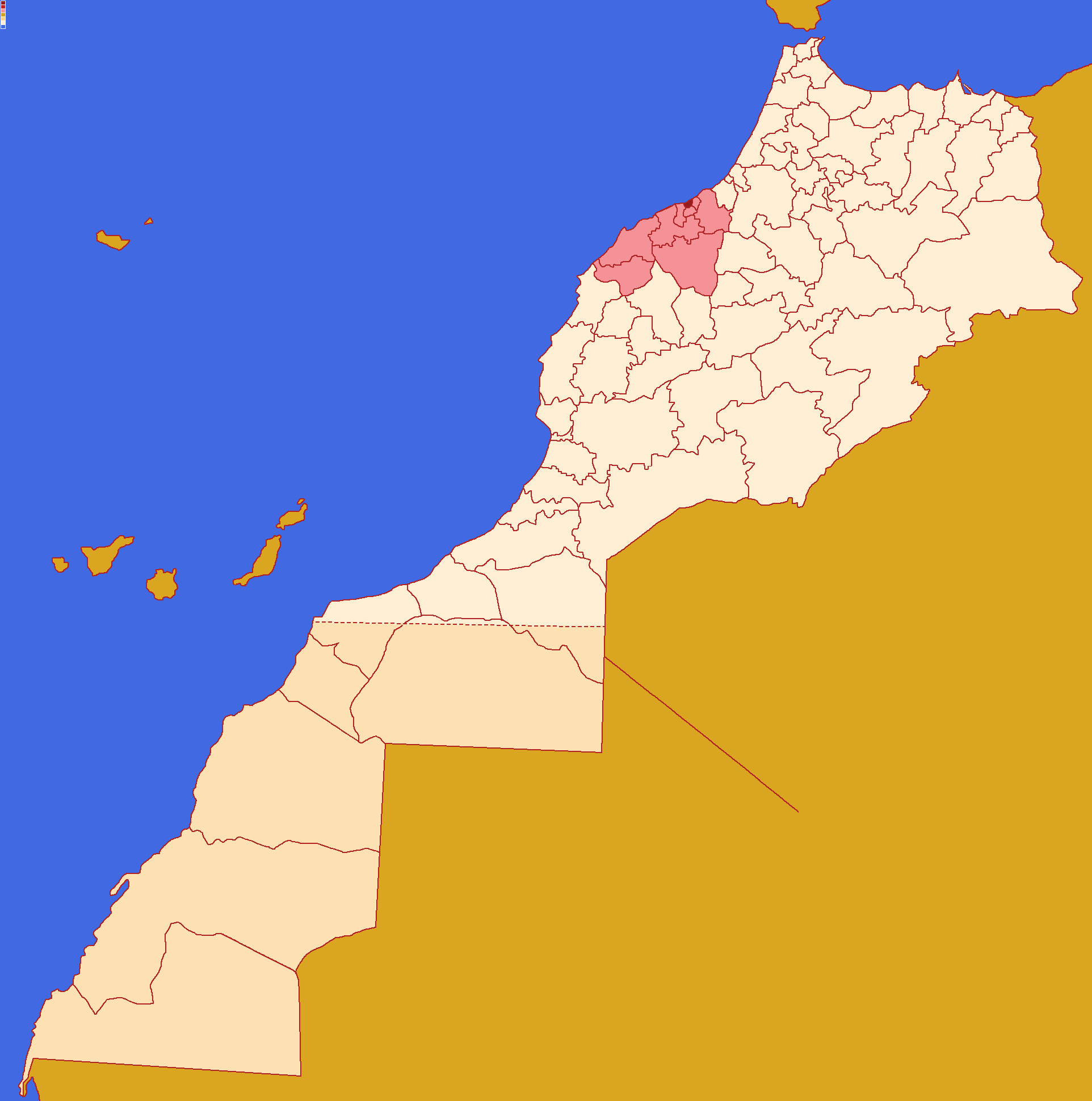 Localização da prefeitura de Casablanca , dentro da região de Casablanca-Settat e dentro de Marrocos. Conforme a reforma administrativa de 2015.